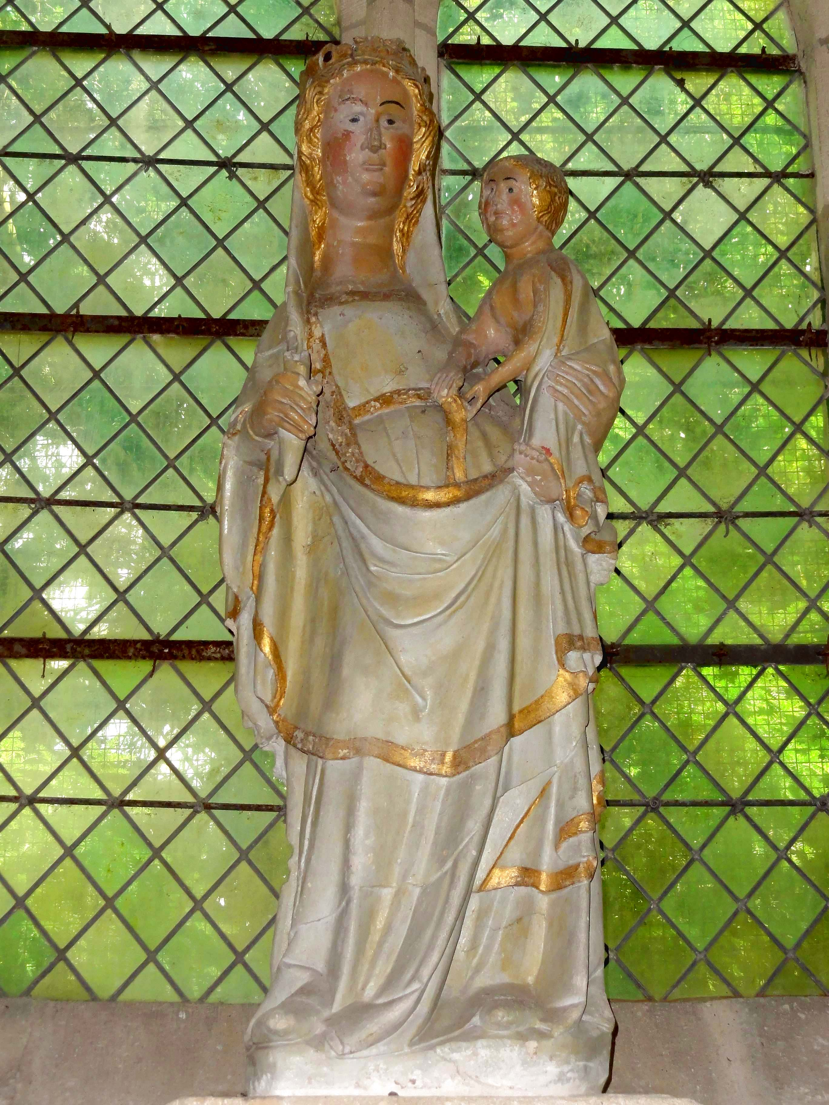 Vierge à l'Enfant du XVIe siècle.